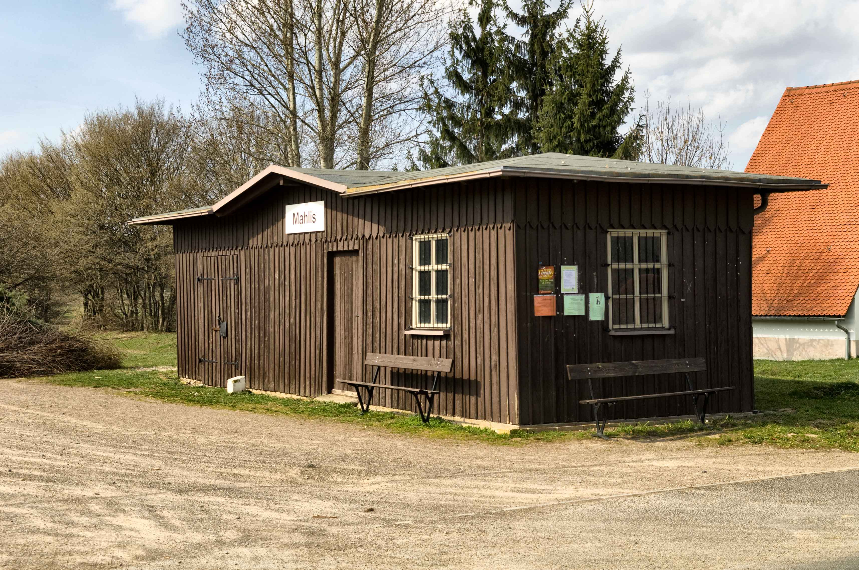 Ehemaliger Bahnhof der Gemeinde Mahlis bei Wermsdorf